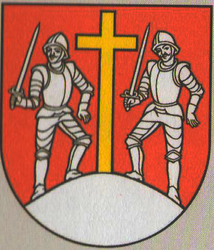 Erb obce Vyšný Komárnik